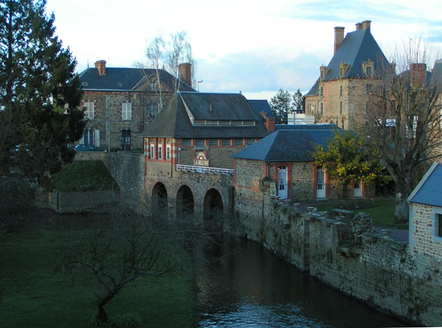 Description: La Sélune à Ducey. Source: photo prise par Christophe Jacquet le 12 mars 2005. © Christophe Jacquet, 2005. Licence